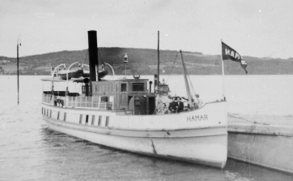 D/S Hamar ved Gjøvik brygge